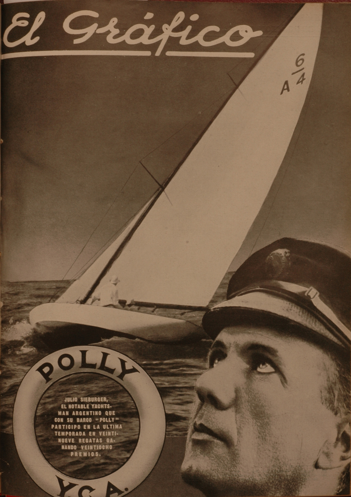 El Grafico del 10 de Enero de 1931. Edicion 600